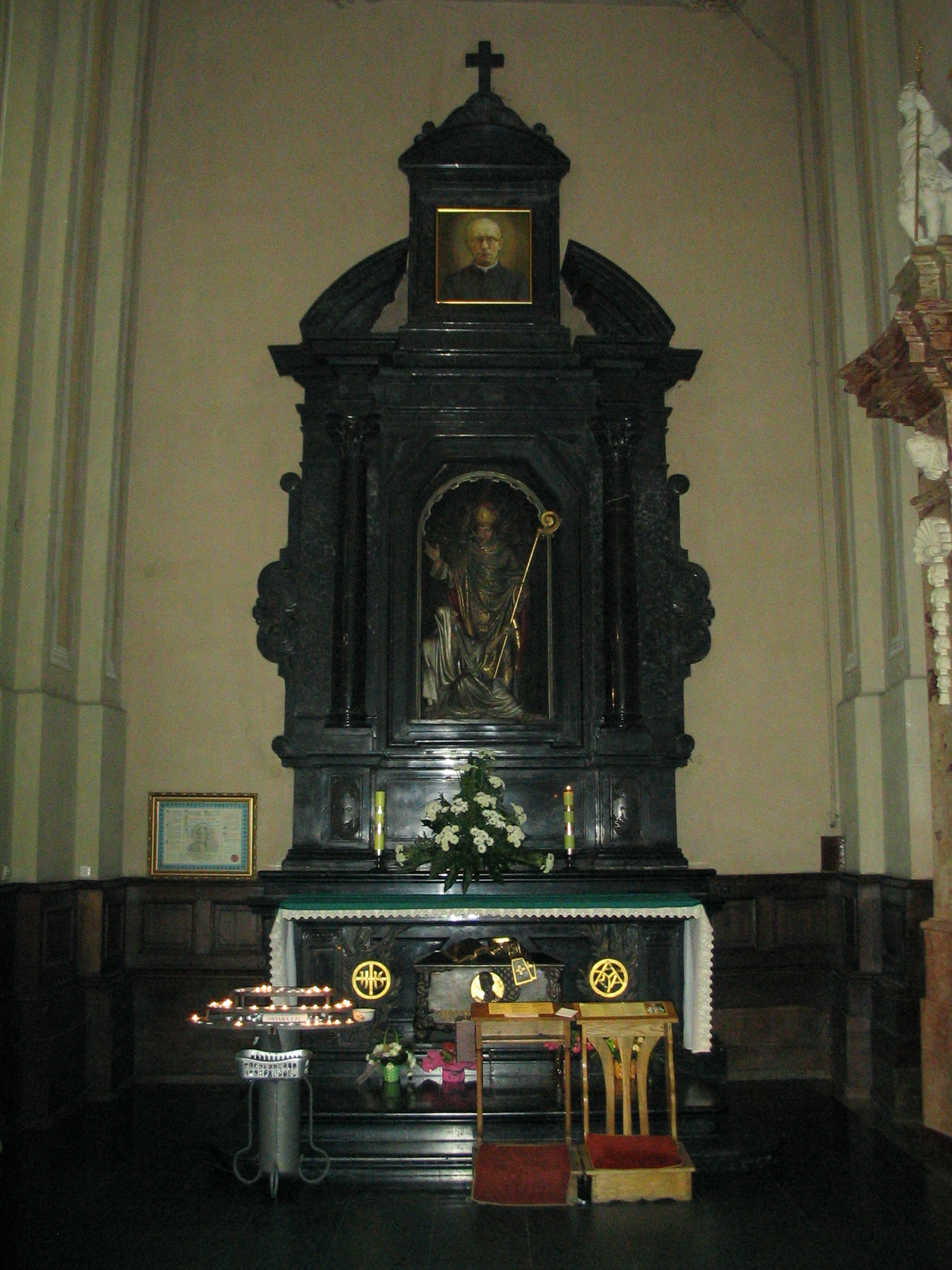 Bazylika Archikatedralna pod wezwaniem Jana Chrzciciela w Przemyślu - barokowy ołtarz z relikwiami bł. Jana Balickiego.